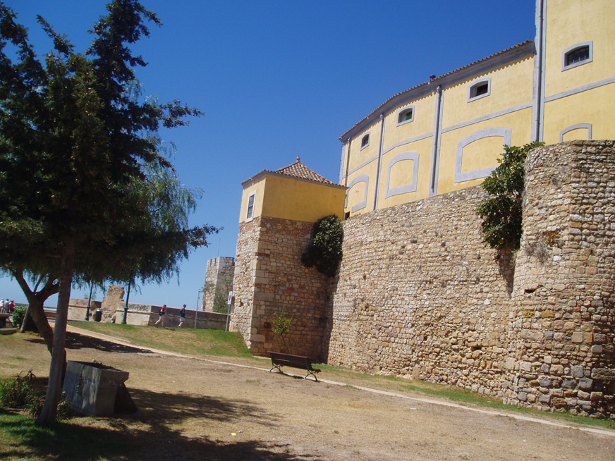 Murallas de Faro. Algarve, Portugal.